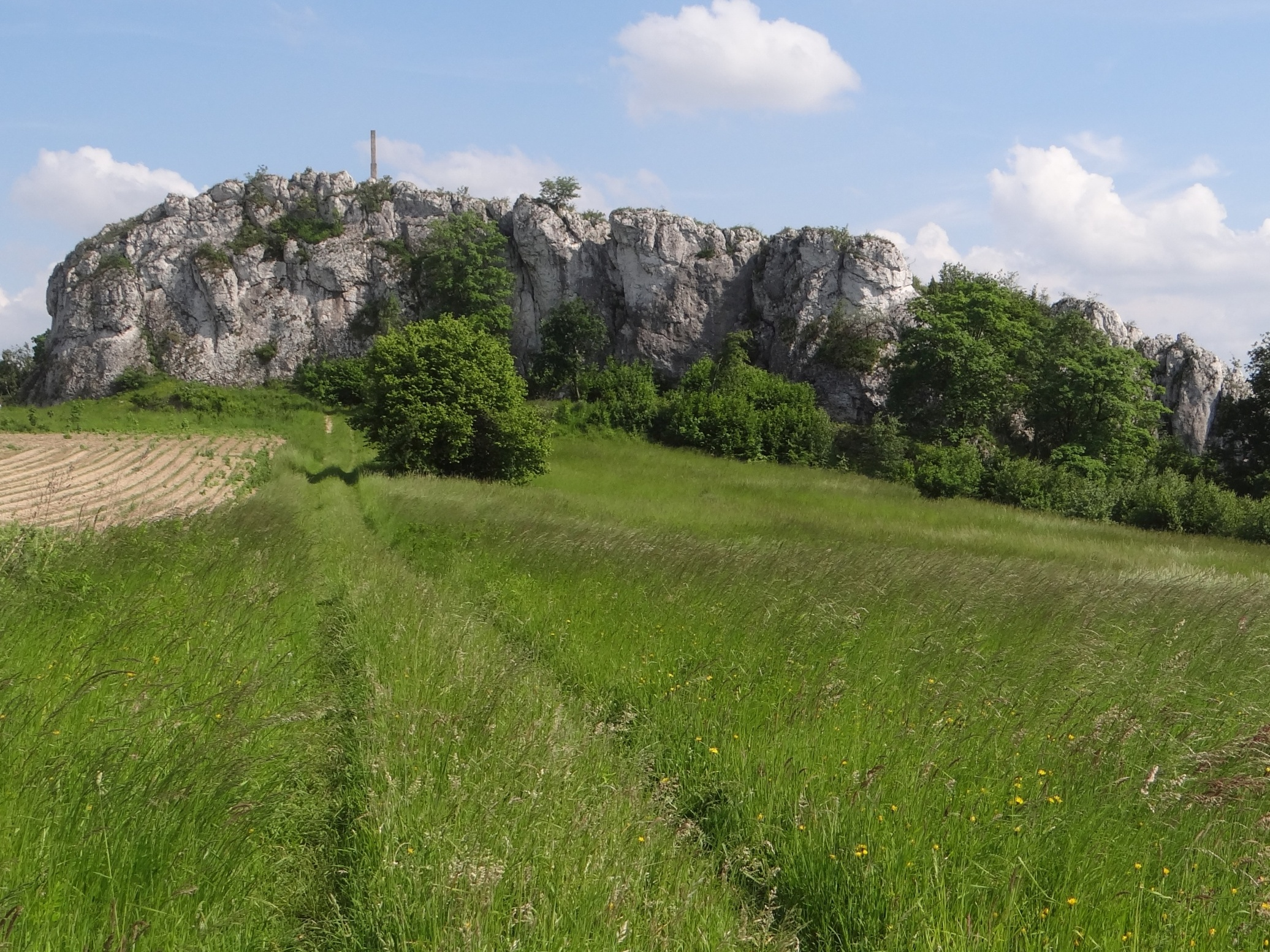 Skała 502. Widok od wschodu